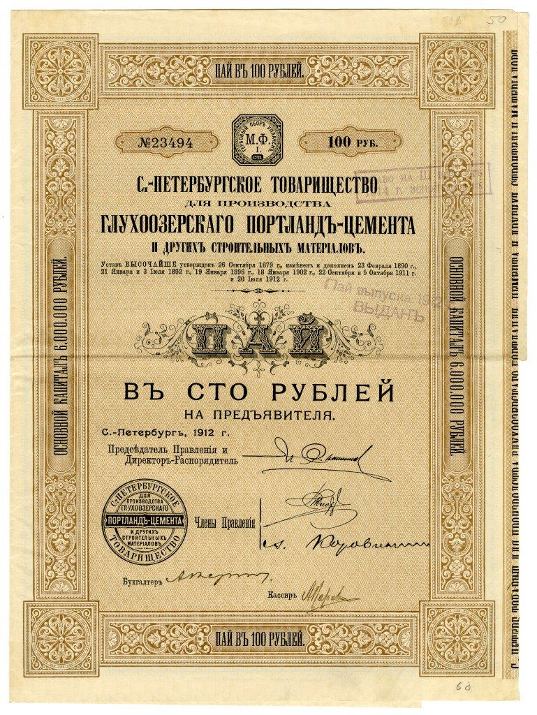 Пай в 100 руб. на предъявителя Глухоозерского товарищества для производства портландцемента и других строительных материалов. С.-Петербург, 1912 г.